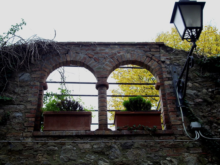 Bifora lungo il tratto occidentale delle Mura di Porrona (GR)